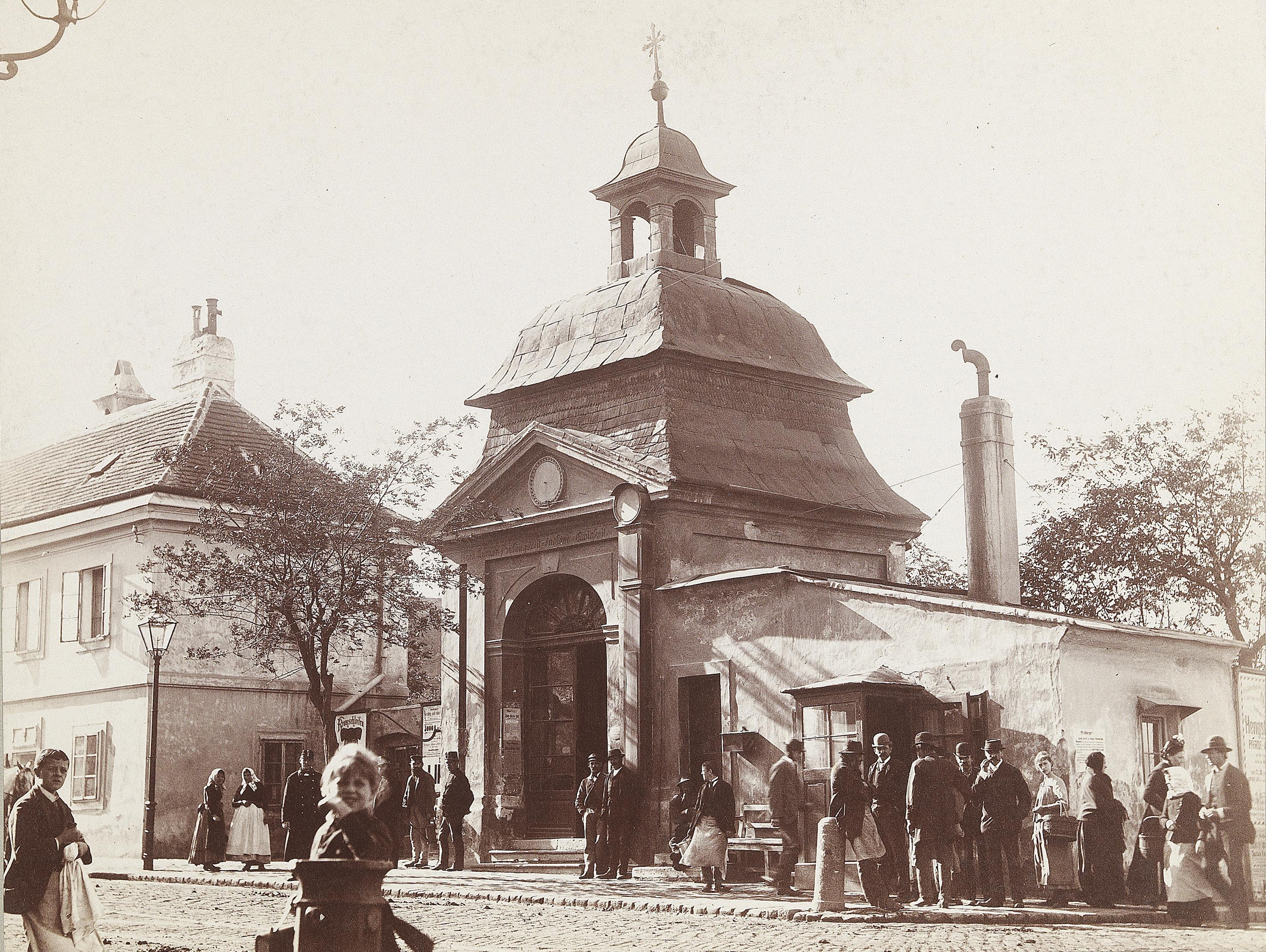 Wien, Matzleinsdorfer Linienkapelle (Kapelle St. Johannes von Nepomuk, auch Delinquentenkapelle genannt), ca. 16,7 x 22,2 cm